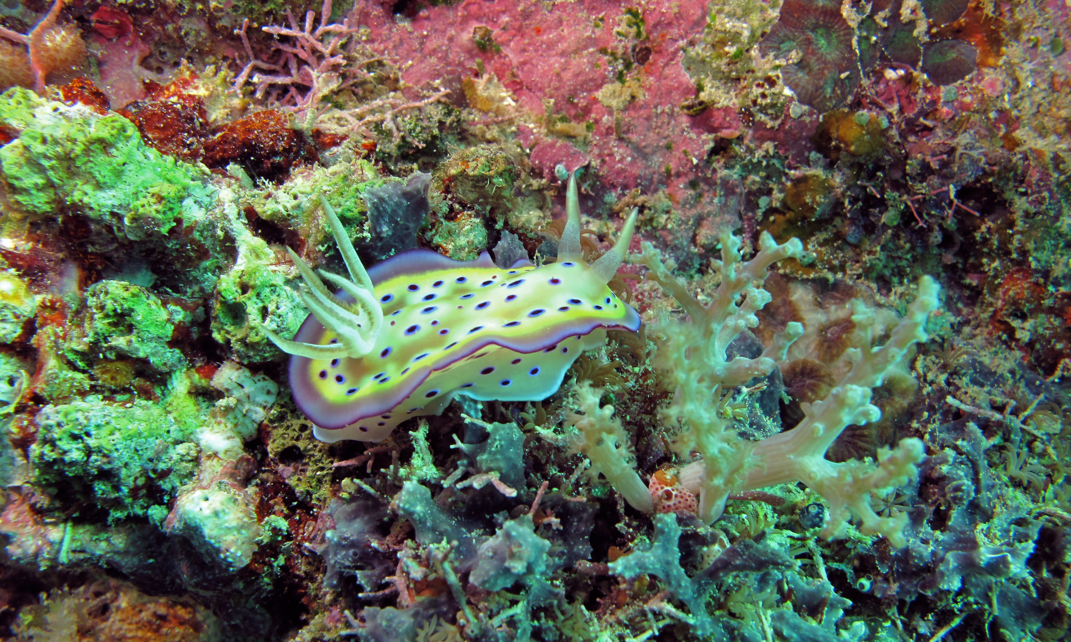 Black Ray Channel, Pulau Kapalai, Sabah, MALAYSIA